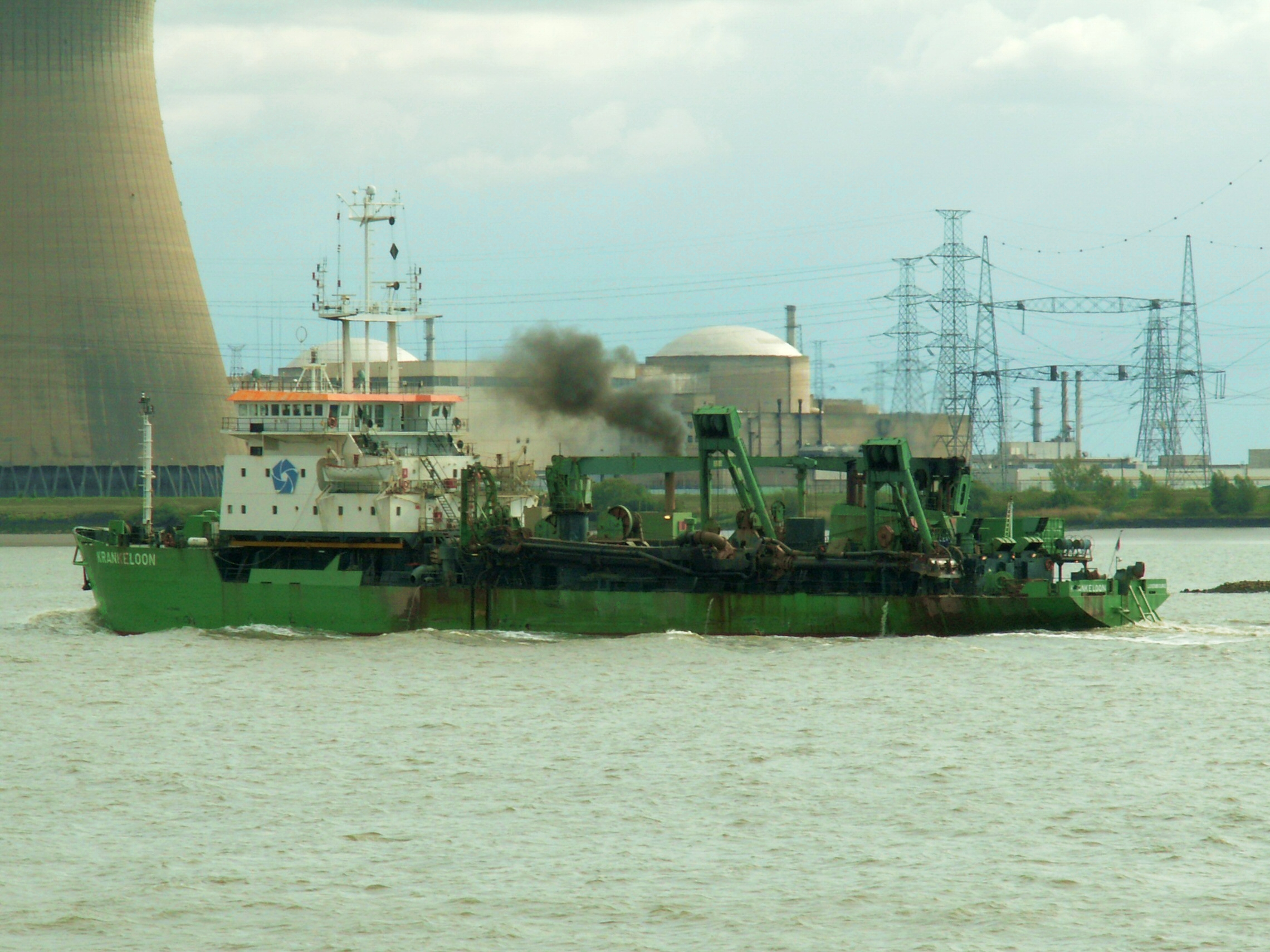 Krankeloon at Antwerp.